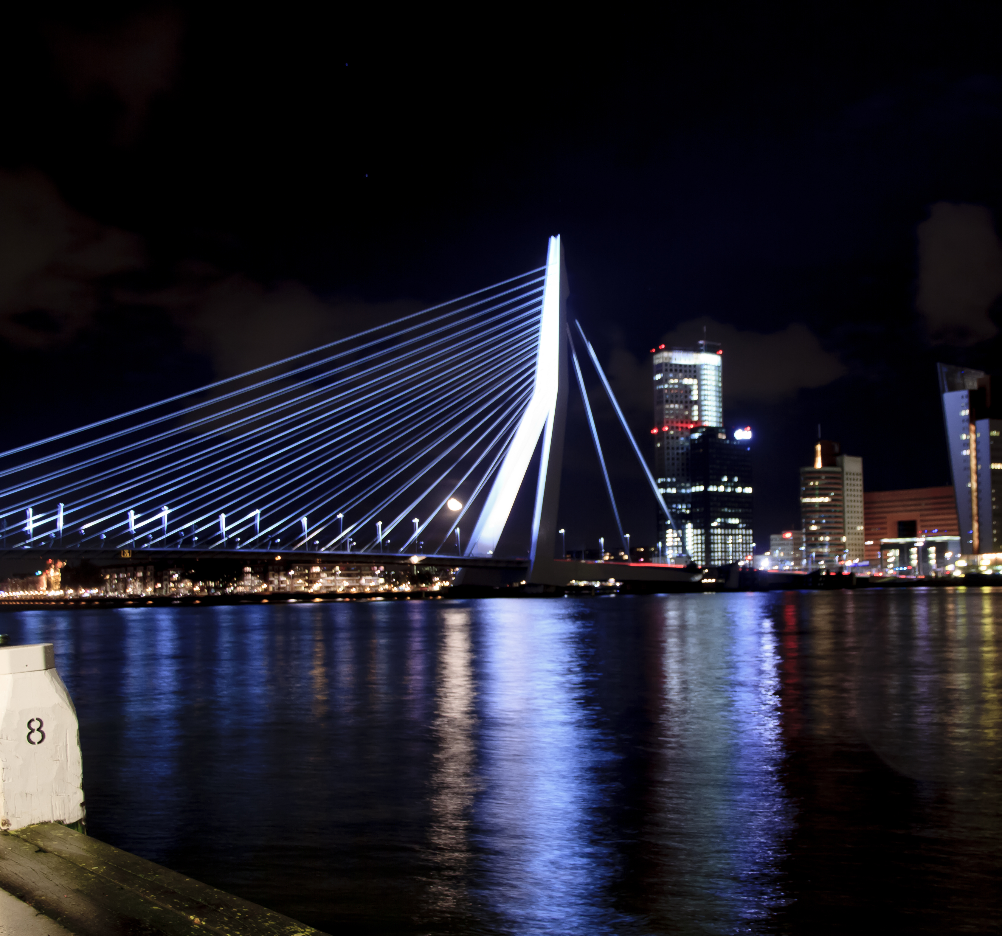 Erasmusbridge